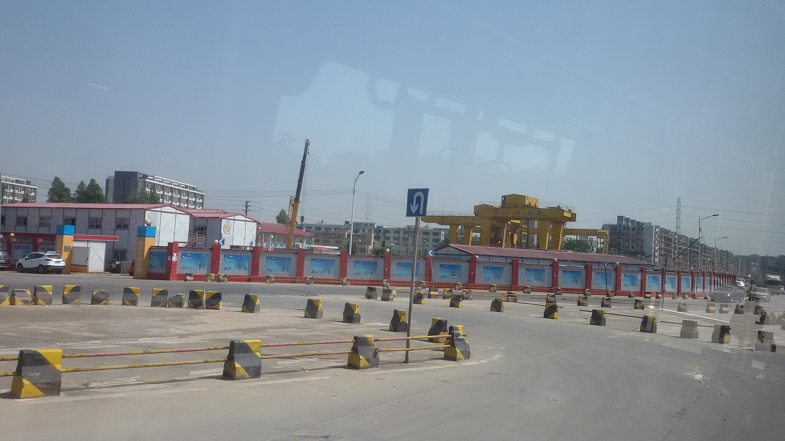 粵語: 2018年4月8號，太和站重喺度起緊。